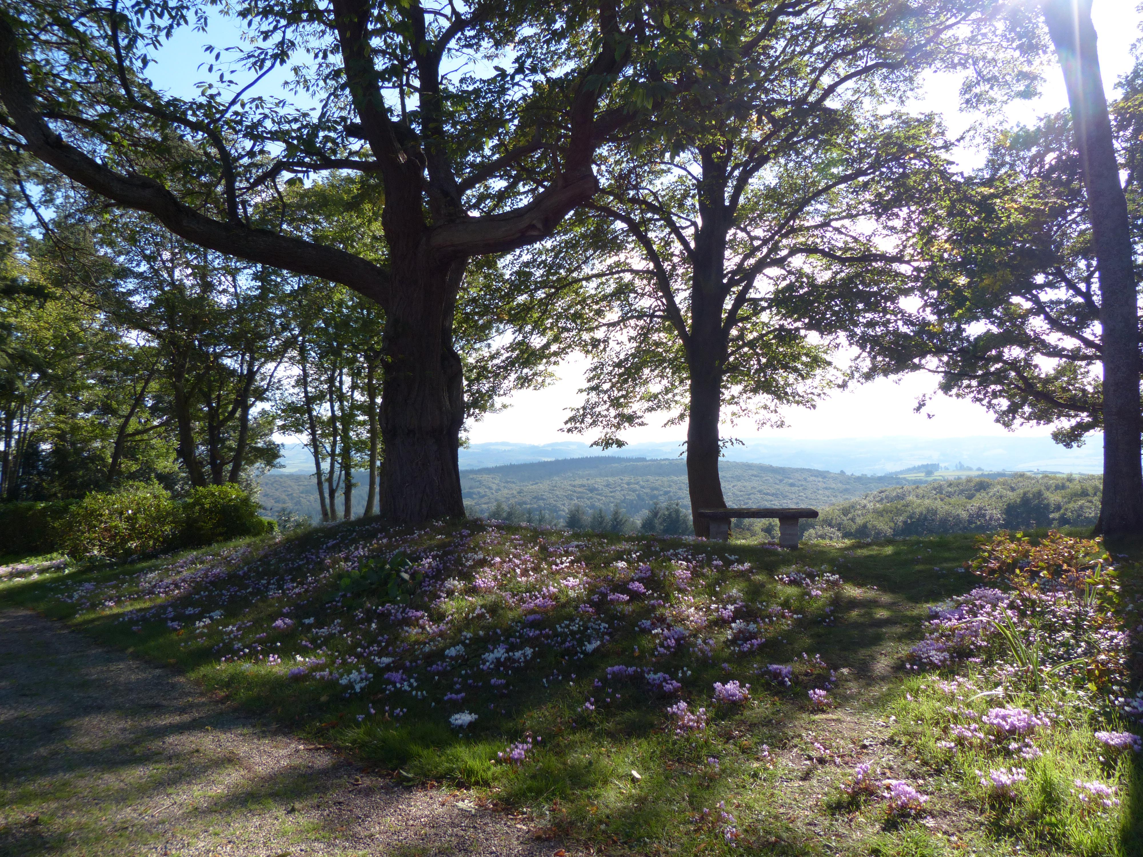 Château du Châtelard, Ébreuil (Allier). Vue vers le sud sur les bois du Châtelard, la vallée de la Sioule et l'Auvergne. Cyclamens de Naples à l'automne.